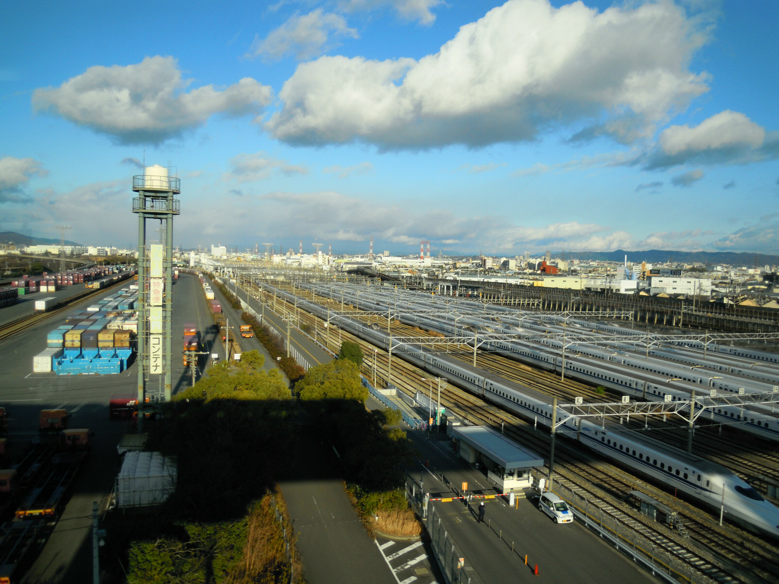 Torikai train base